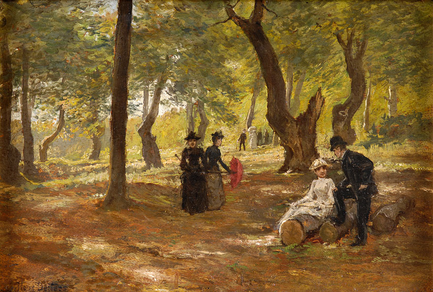 Der Sonntagsspaziergang, Öl auf Holz, 22 x 33 cm